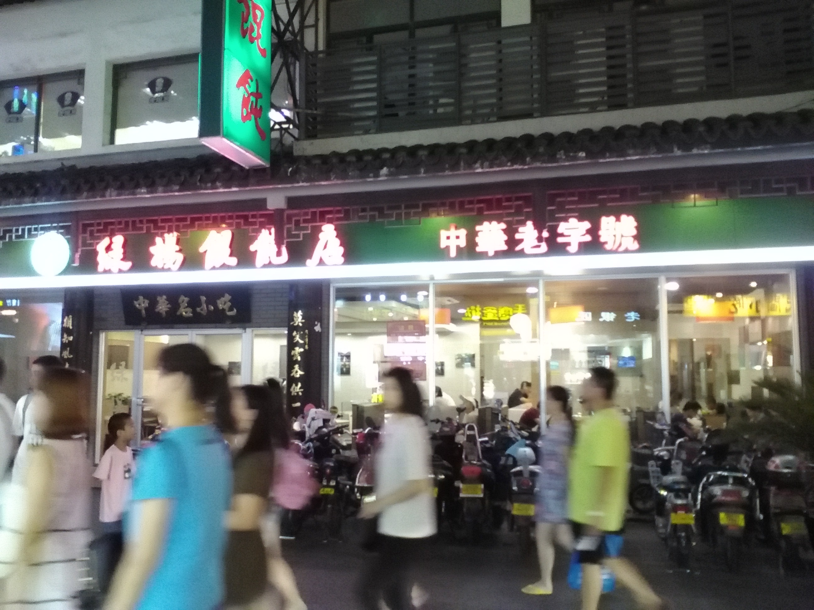 中文（中国大陆）: 苏州绿杨馄饨店（其中一家门店）